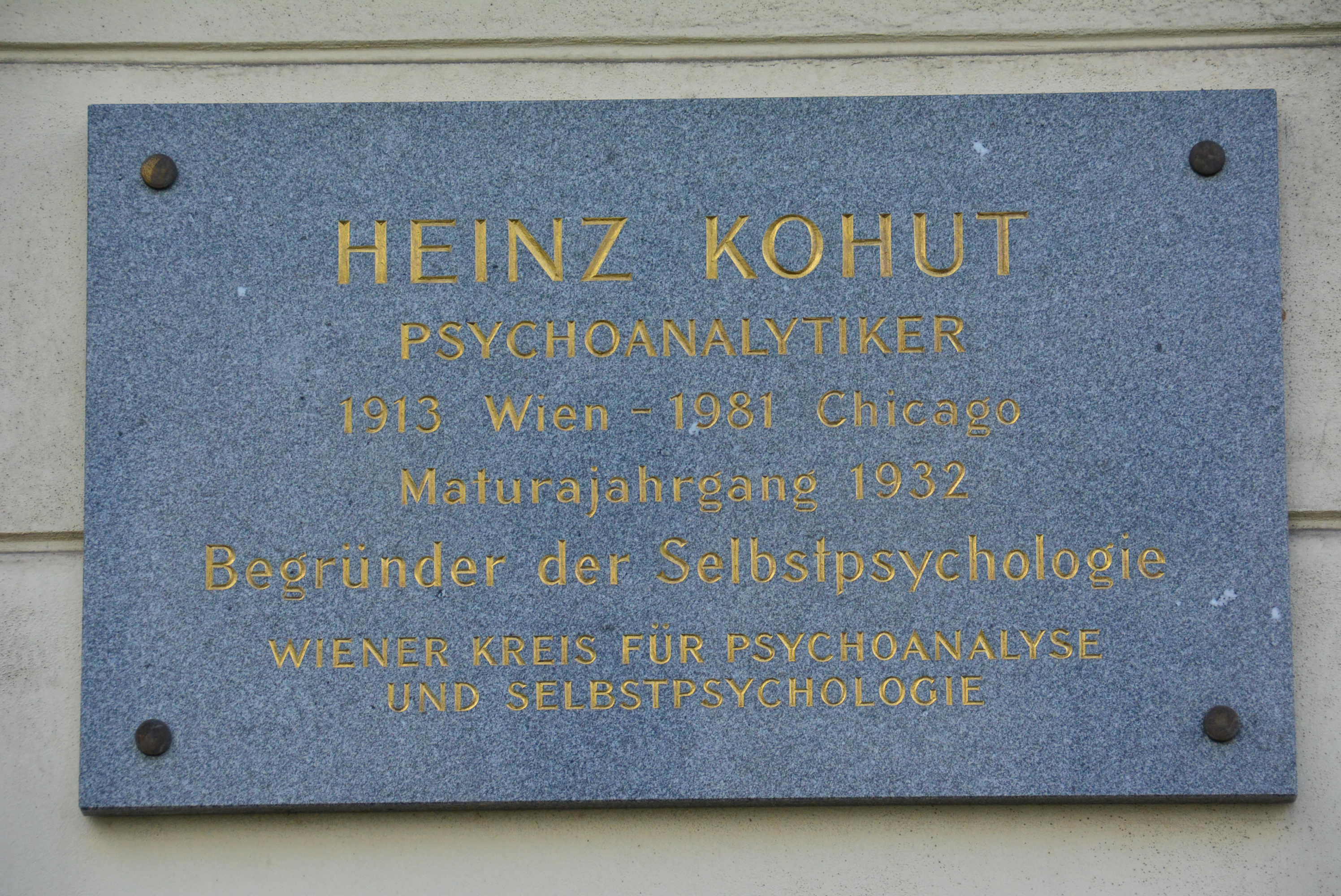 Gedenktafel für Heinz Kohut (Wien, Gymnasiumstraße 83)